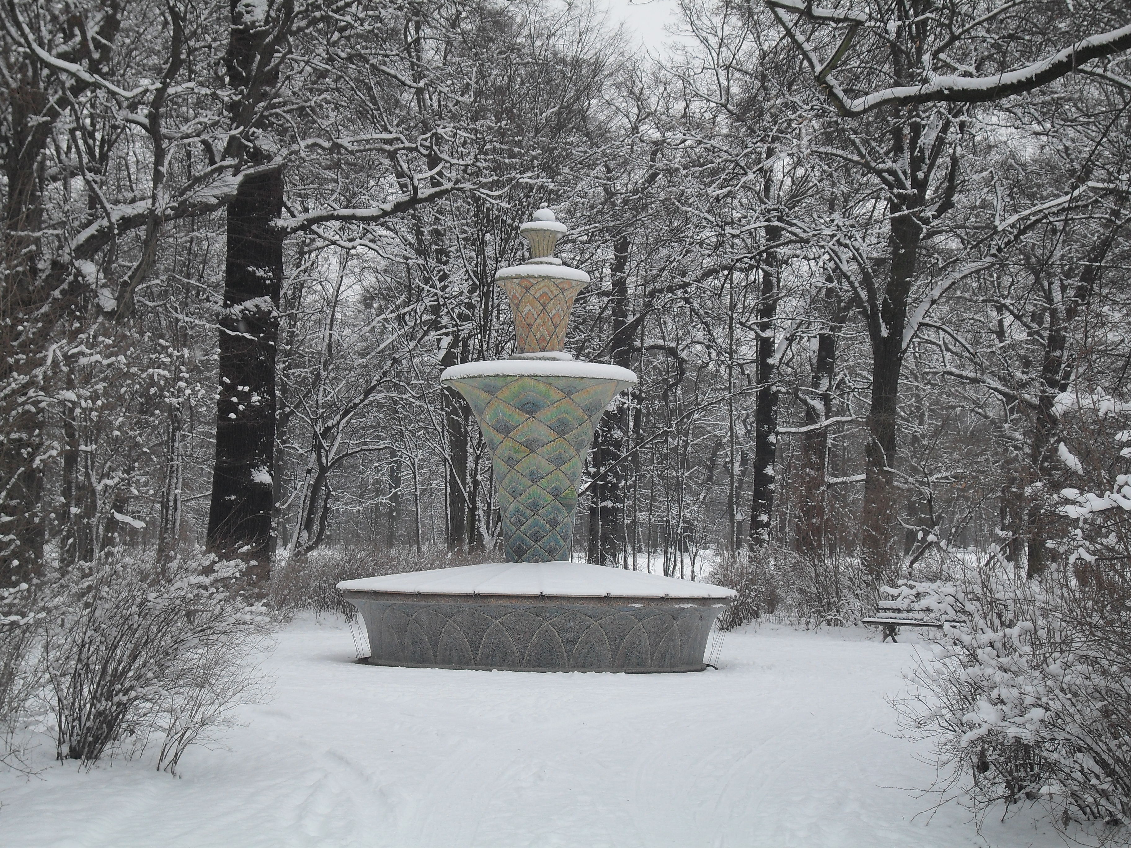 Abgebildet ist der im Winter abgedeckte Mosaikbrunnen im Großen Garten von Dresden. Der Brunnen wurde anlässlich der Internationalen Gartenbauausstellung von 1926 als temporäres Bauwerk errichtet. Nach Ende der Ausstellung sollte er abgerissen werden, durfte dann aber doch an seinem Platz stehenbleiben. Die letzte Sanierung wurde im August 2016 abgeschlossen.